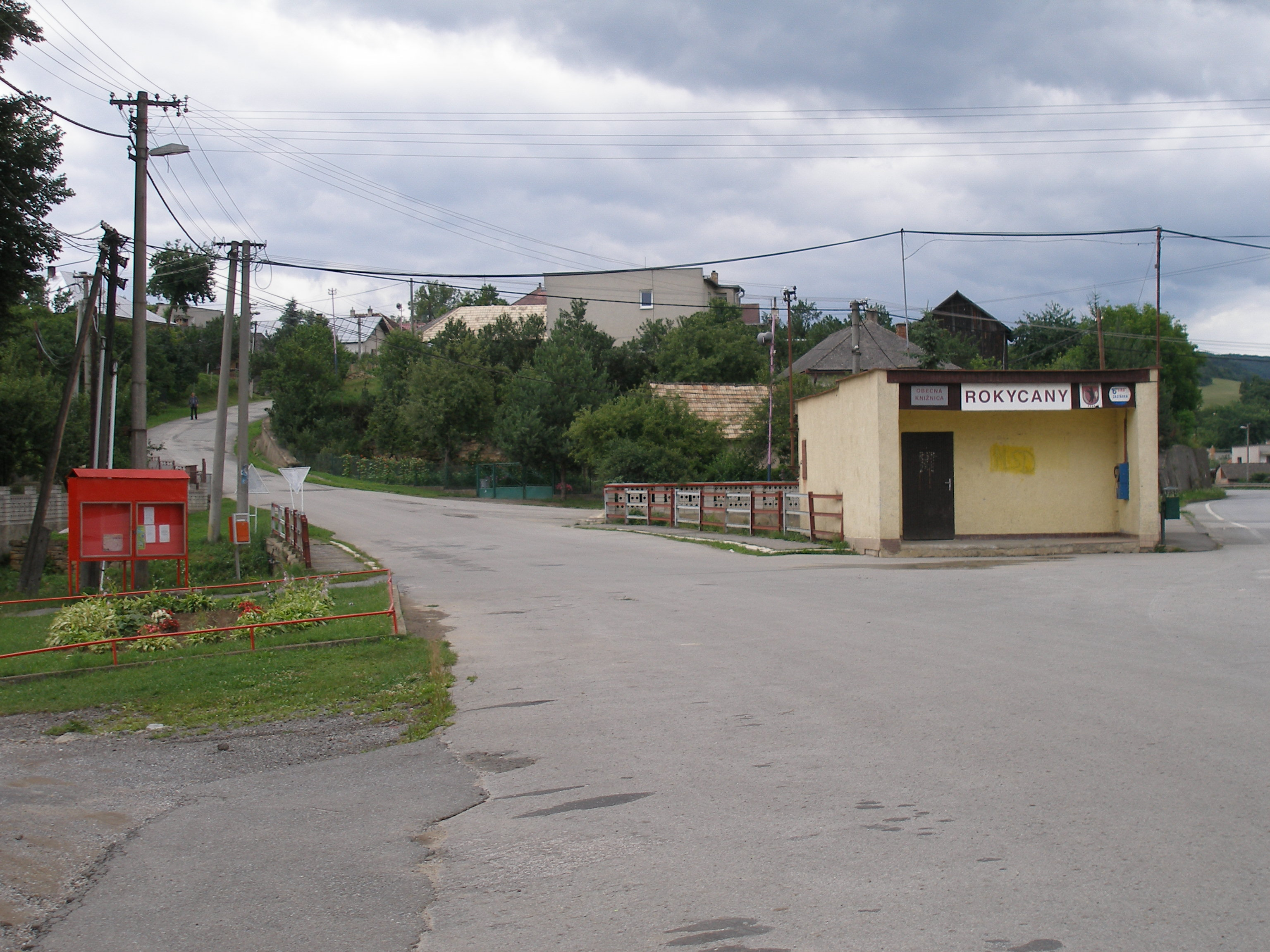 Obec Rokycany v Šarišskej vrchovine, okr.Prešov, región Šariš